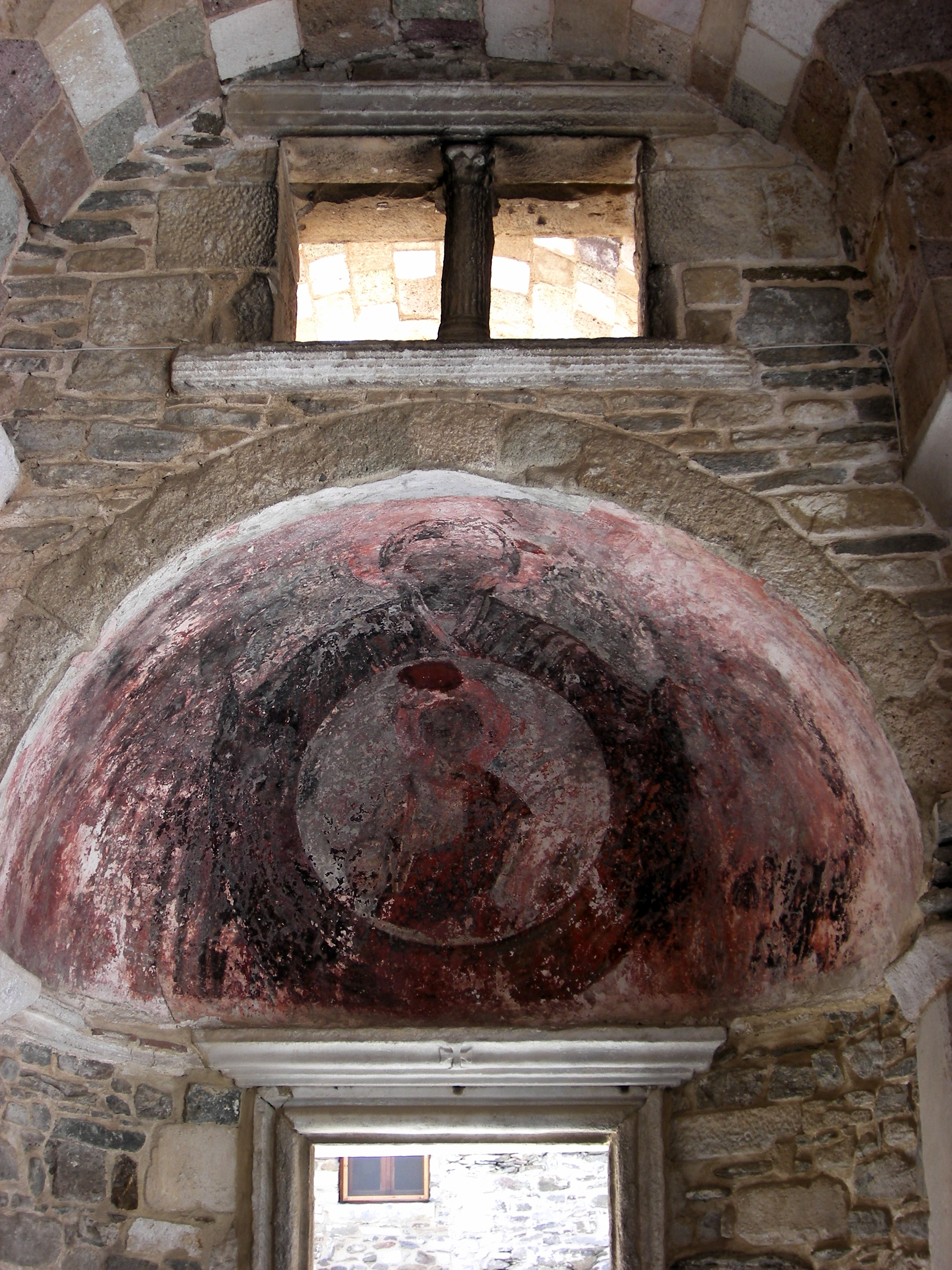 Fragment de fresque, conque droite du narthex, Ekatontapyliani : Vierge de victoire (Nikopoios) avec le Christ en médaillon sur la poitrine, flanquée des archanges Michel et Gabriel. XVIIe-XVIIIe siècles